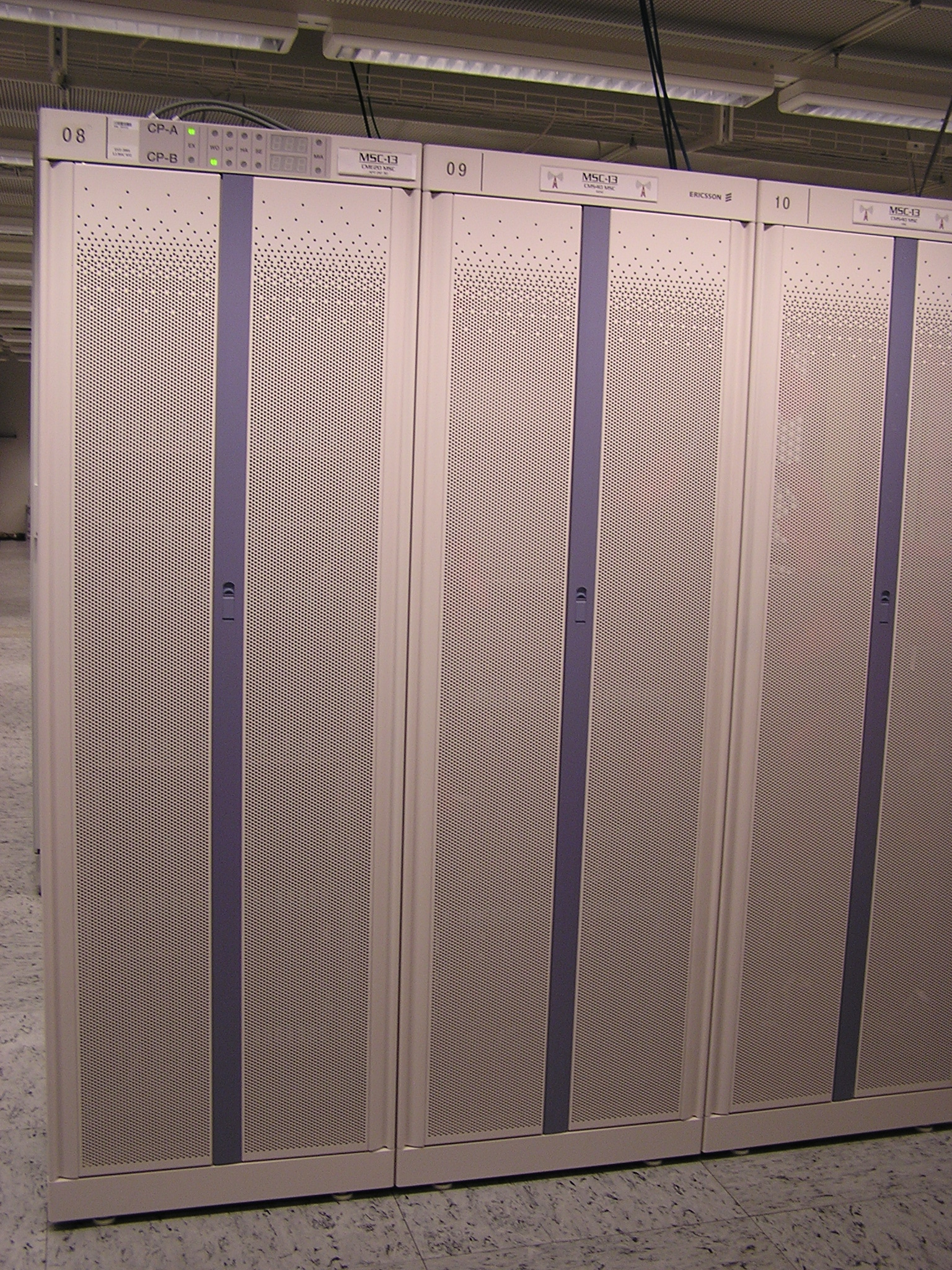 Mobile Switching Centre (na bazie ericssonowskiej platformy AXE) wykorzystywane w sieciach GSM i UMTS.